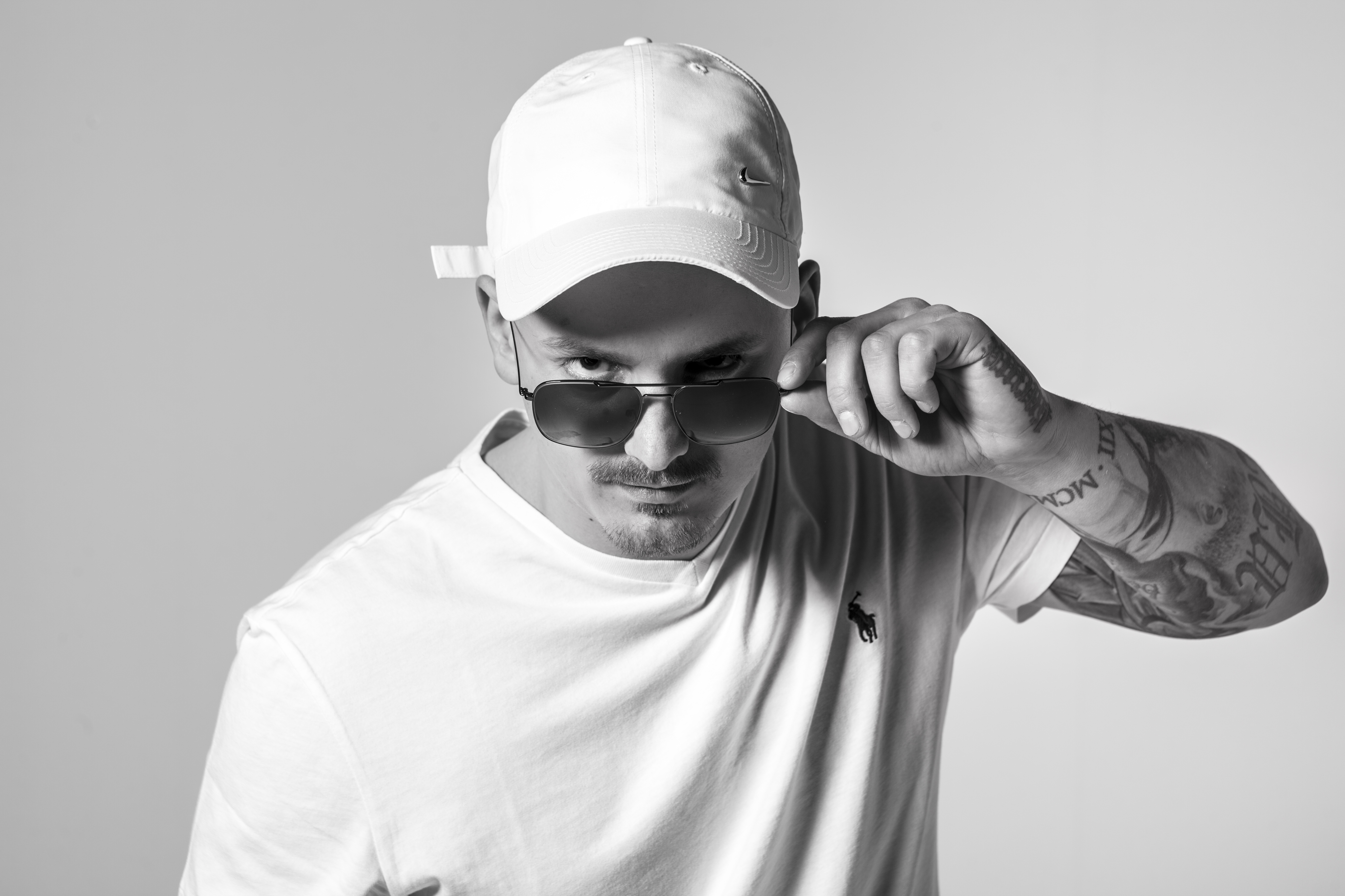 Herzog Pressefoto